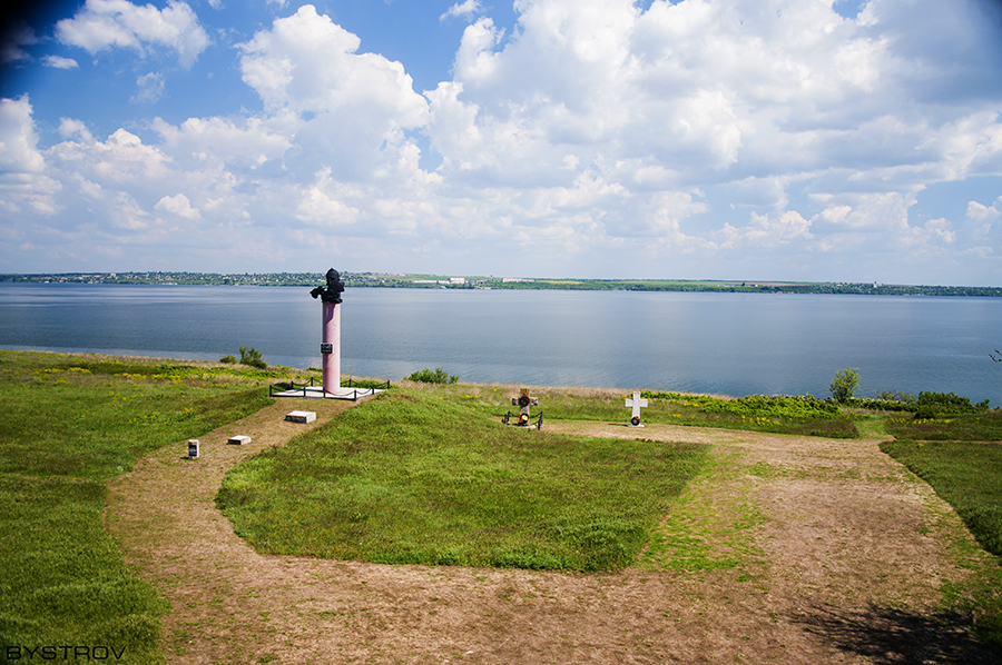 Каменская Сечь